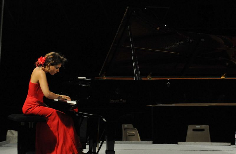 Concert de Stéphanie Elbaz